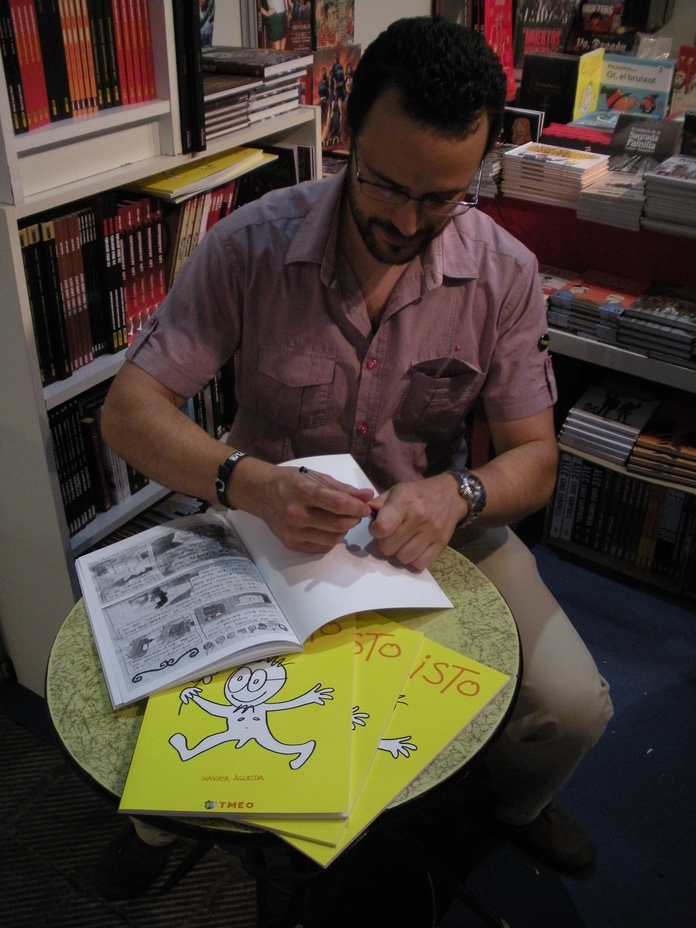 El historietista Xavier Àgueda en el Salón del Cómic de Barcelona 2011